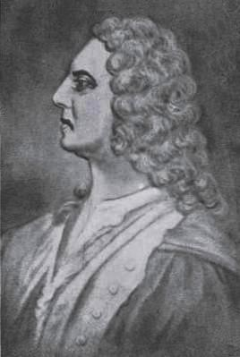 Augustin de Saffray de Mézy. Chevalier, gouverneur de la Nouvelle-France de 1663 à 1665 (le premier à servir immédiatement sous les ordres de Louis XIV après que le roi eut repris l'administration de la colonie des mains de la Compagnie des Cent-Associés en 1663) ; décédé à Québec dans la nuit du 5 au 6 mai 1665. (tiré du Dictionnaire biographique du Canada).